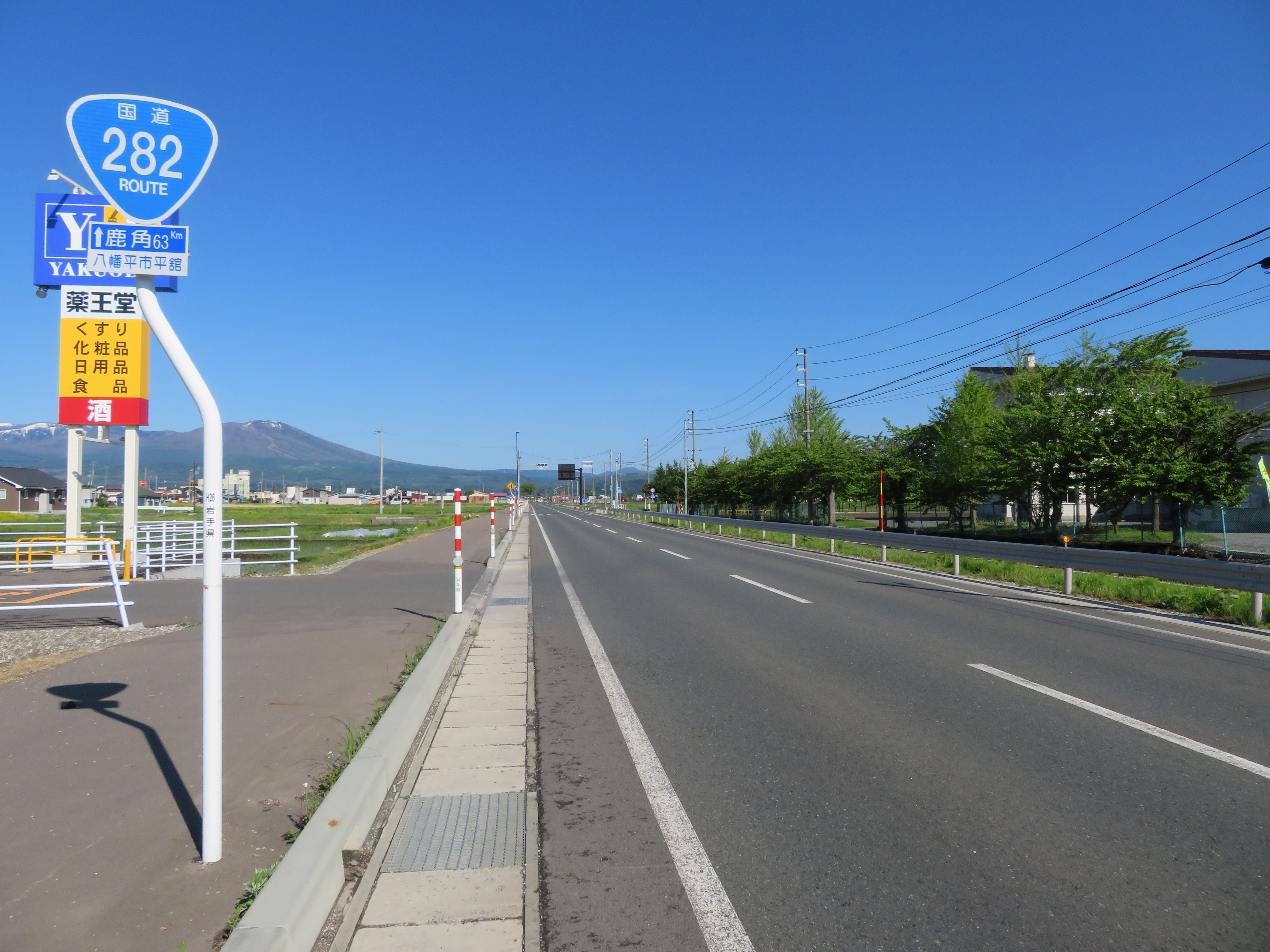 国道282号線西根バイパス岩手県八幡平市平舘付近（鹿角方面を撮影） Canon PowerShot SX720 HS